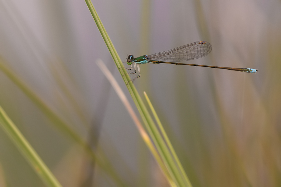 Zwerglibelle, Männchen in Brandenburg